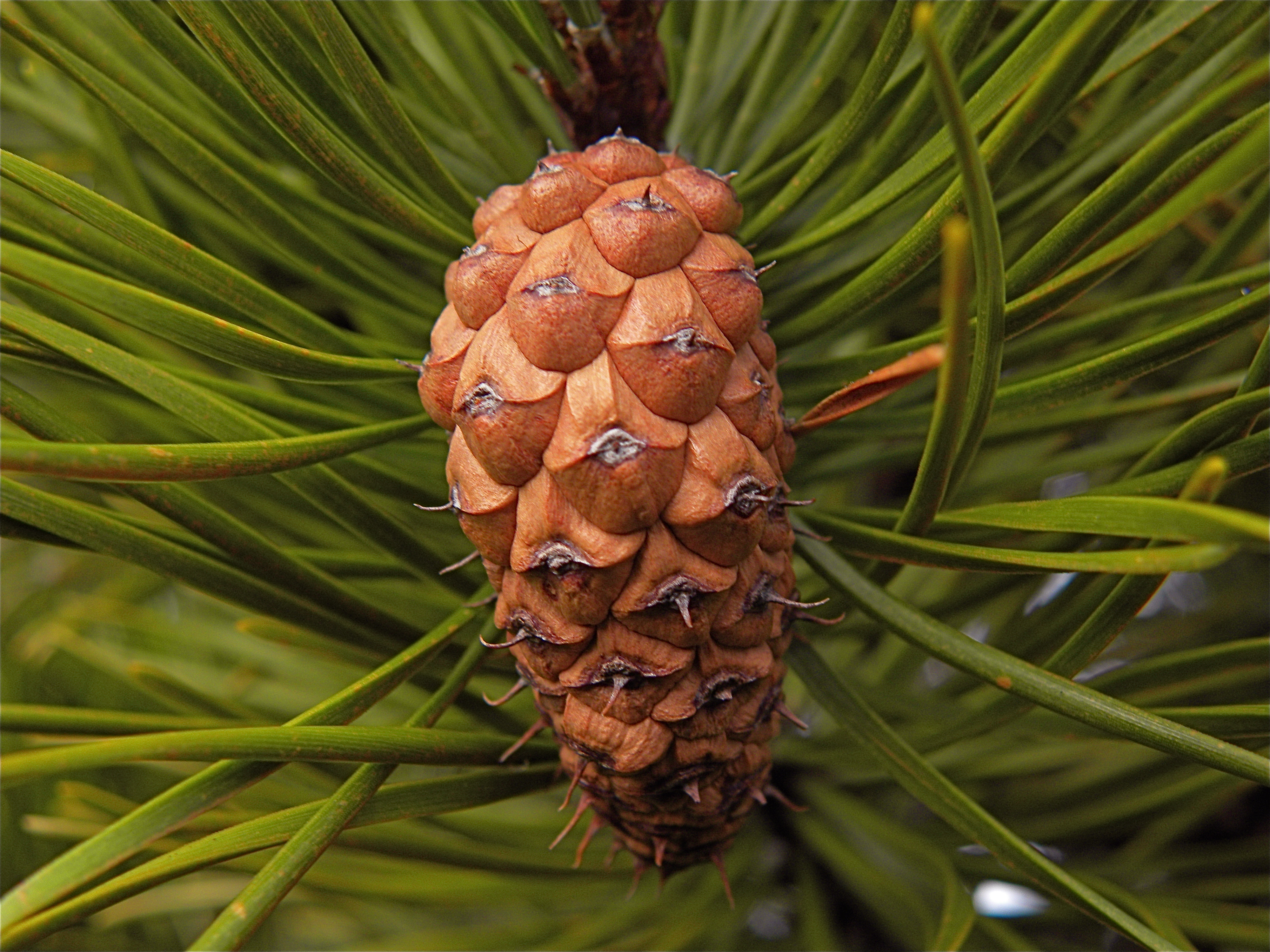 Pinus contorta subsp. contorta cone. Little Si, Washington, USA, approx 47°29'56"N 121°45'17"W.